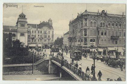 Theaterplatz, Bromberg (Bydgoszcz) (1911)